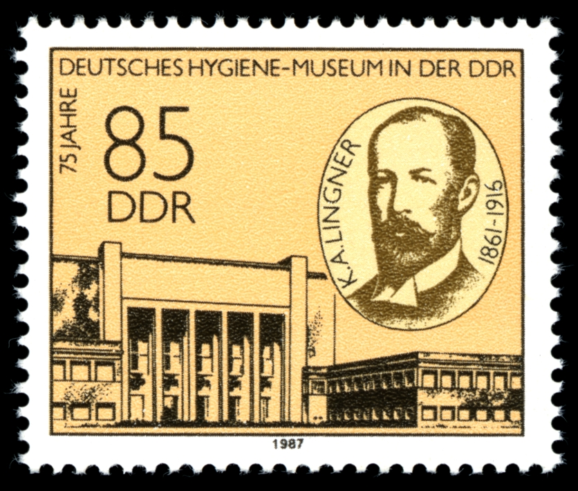 Information: Ausgabepreis: Pfennig First Day of Issue / Erstausgabetag: Auflage: Entwurf: Druckverfahren: Michel-Katalog-Nr: Ländercode-MiNr